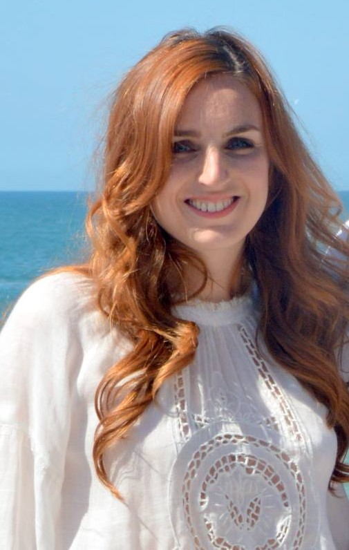 Alison Wheeler au festival de Cabourg